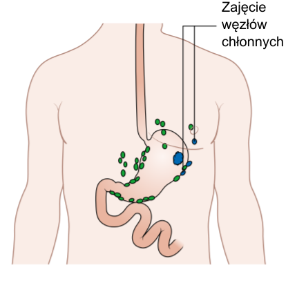 Zajęcie węzłów chłonnych w raku żołądka